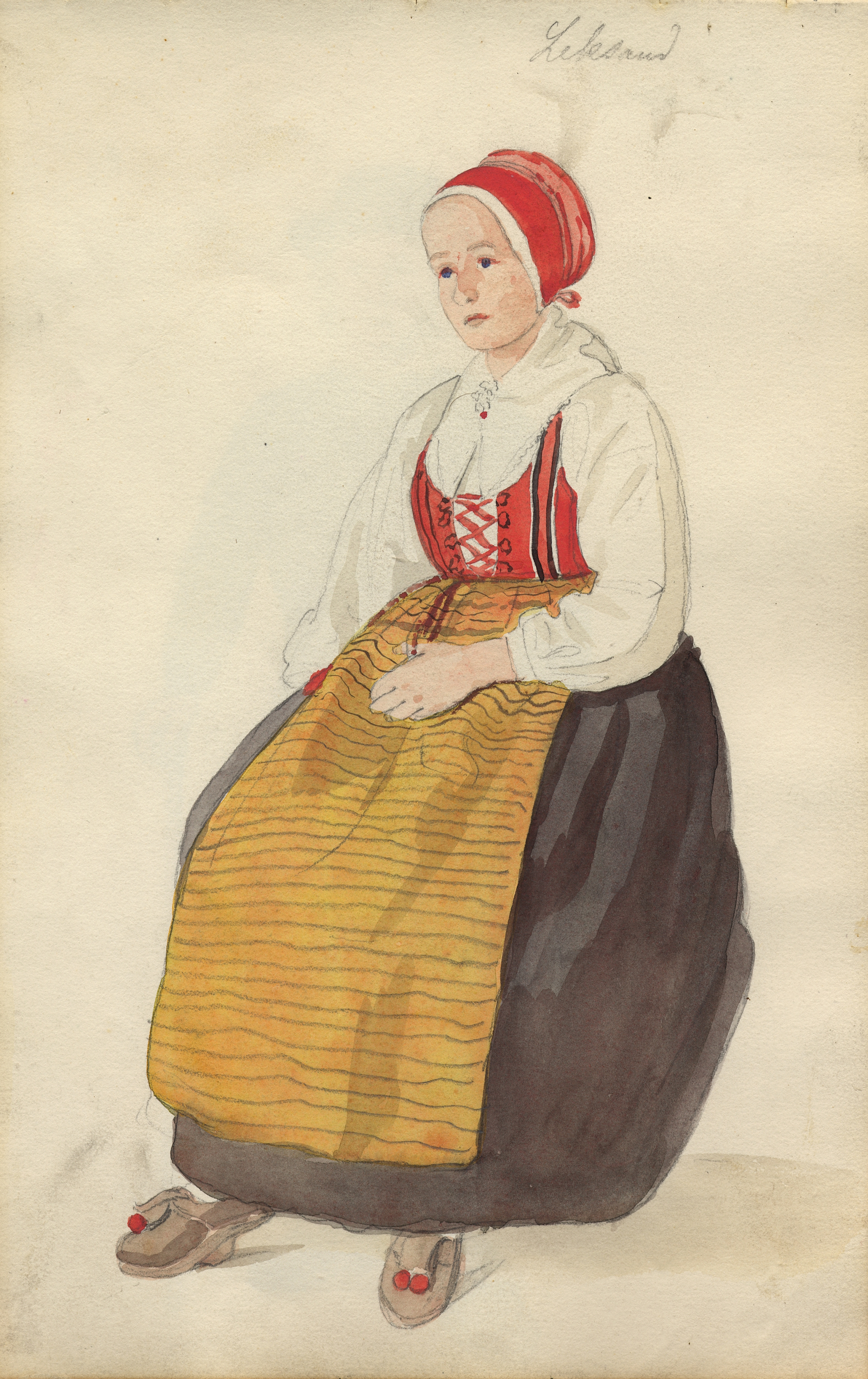 Akvarell. "Leksand" Kvinna i dräkt, sittande i helfigur. Ur Skissbok av A. J.G. Virgin